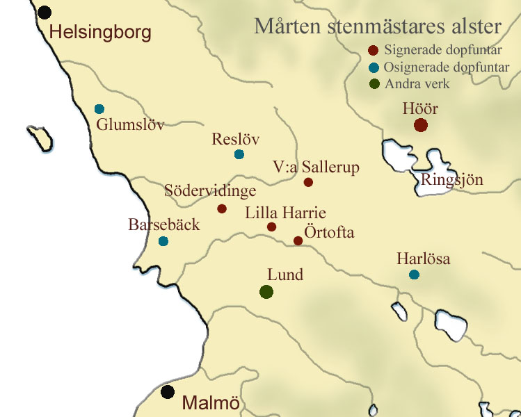 Karta över Mårten stenmästares 1100-tals verk i Skåne. Svarta punkter anger moderna orienteringsorter.